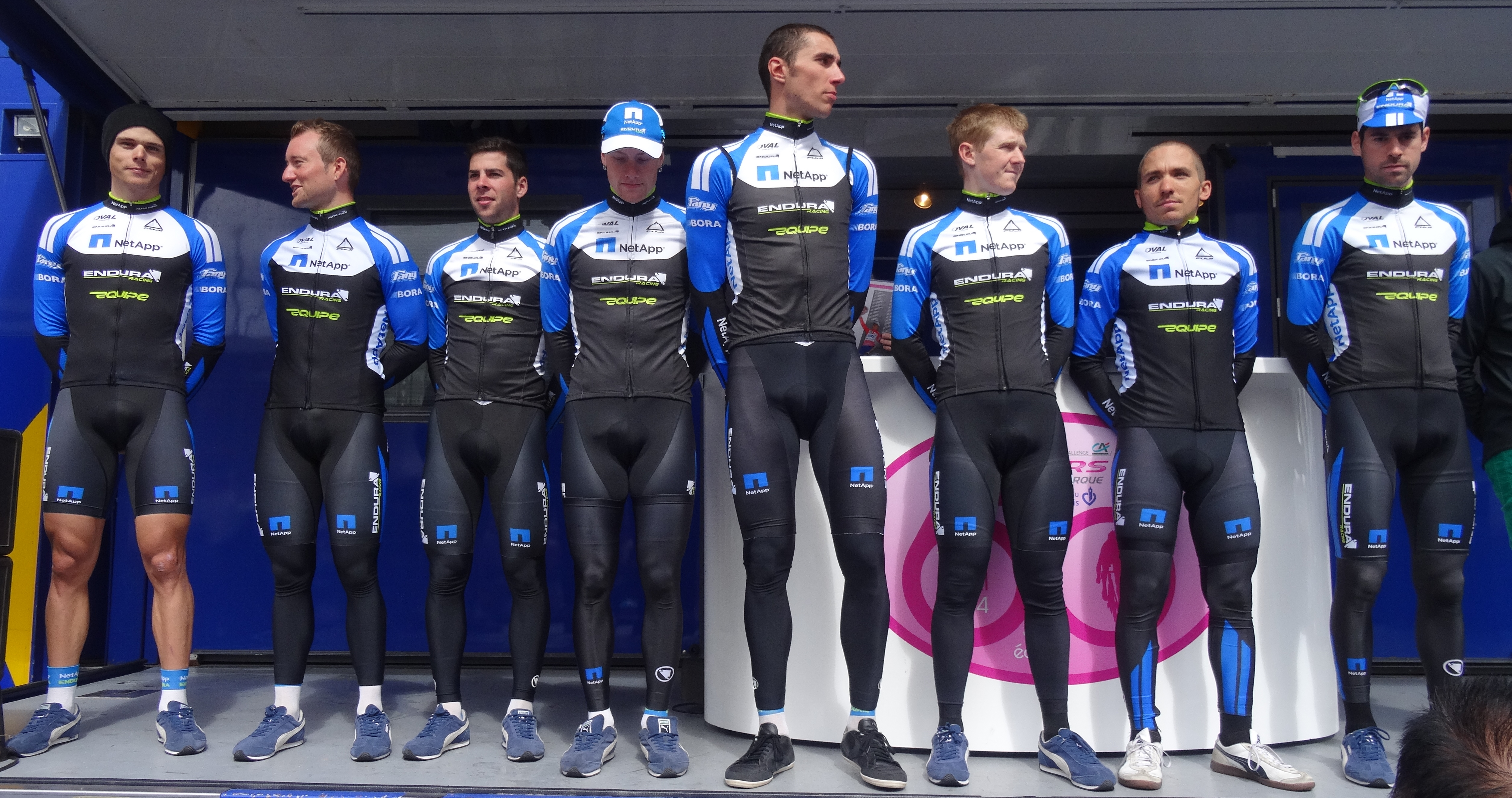 Reportage photographique réalisé le mercredi 7 mai 2014 au départ de la première étape de l'édition 2014 des Quatre jours de Dunkerque à Dunkerque, Nord, Nord-Pas-de-Calais, France. Depicted people: Daniel Schorn, Ralf Matzka, Michael Schwarzmann, Sam Bennett, Blaž Jarc, Erick Rowsell, Cesare Benedetti and Jonathan McEvoy Depicted team: NetApp-Endura